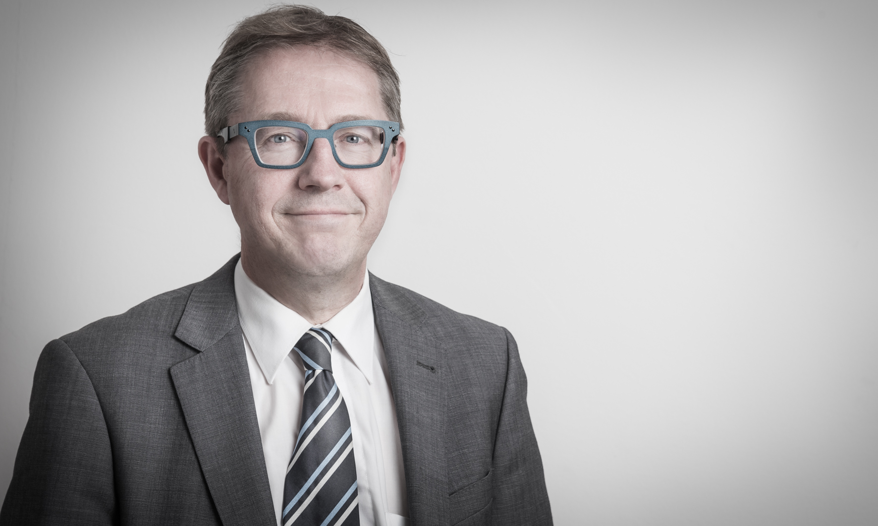 Portrait Bob Martens